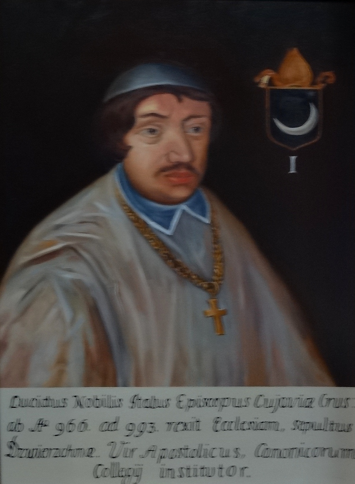 Lucidus, biskup kruszwicki w latach 966–993